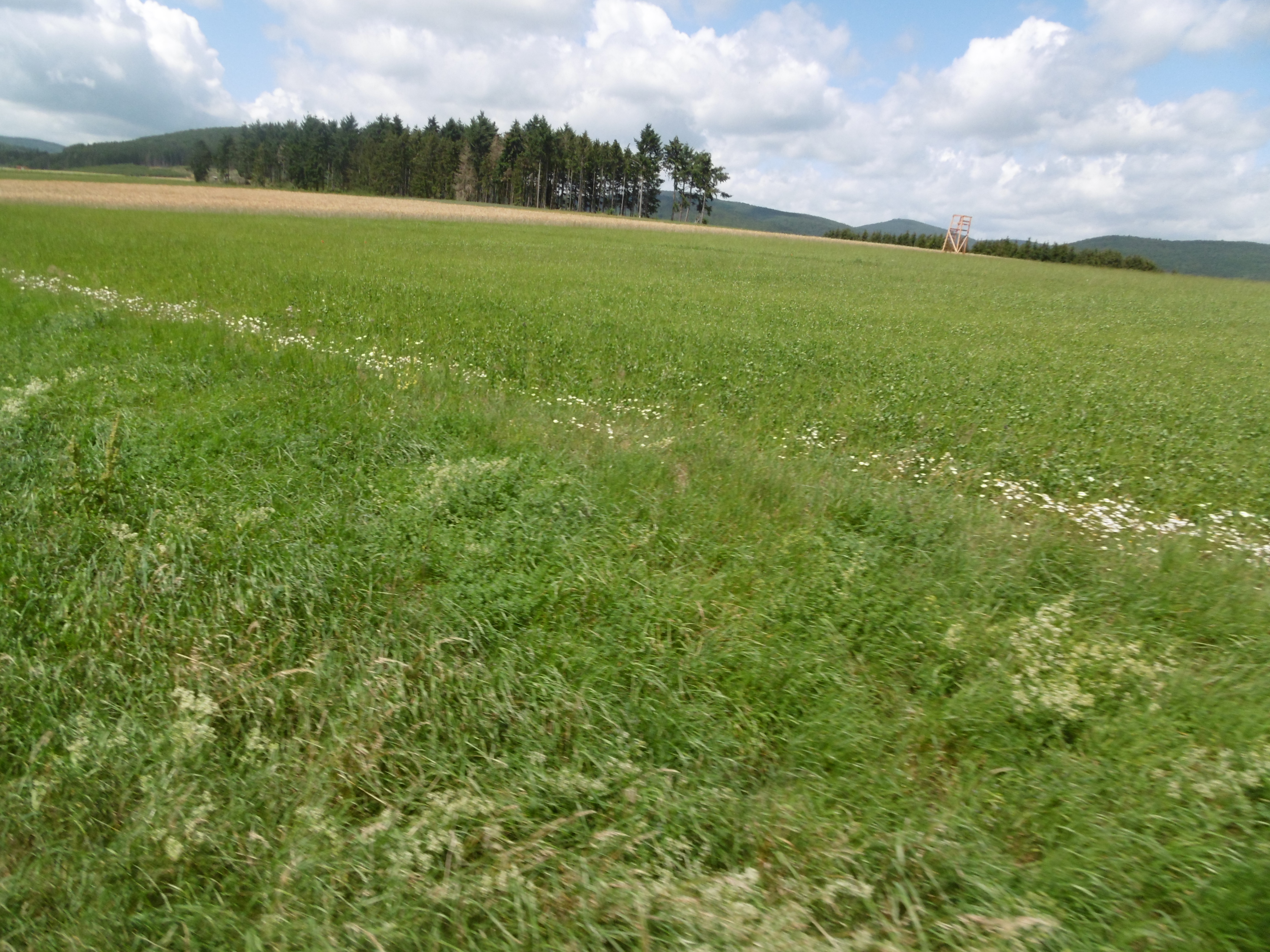 Landschaftsschutzgebiet Medebacher Kernraum: Quellmulden, Niederungszonen und Flächhänge​ nördlich Weg Medebach nach Medelon.